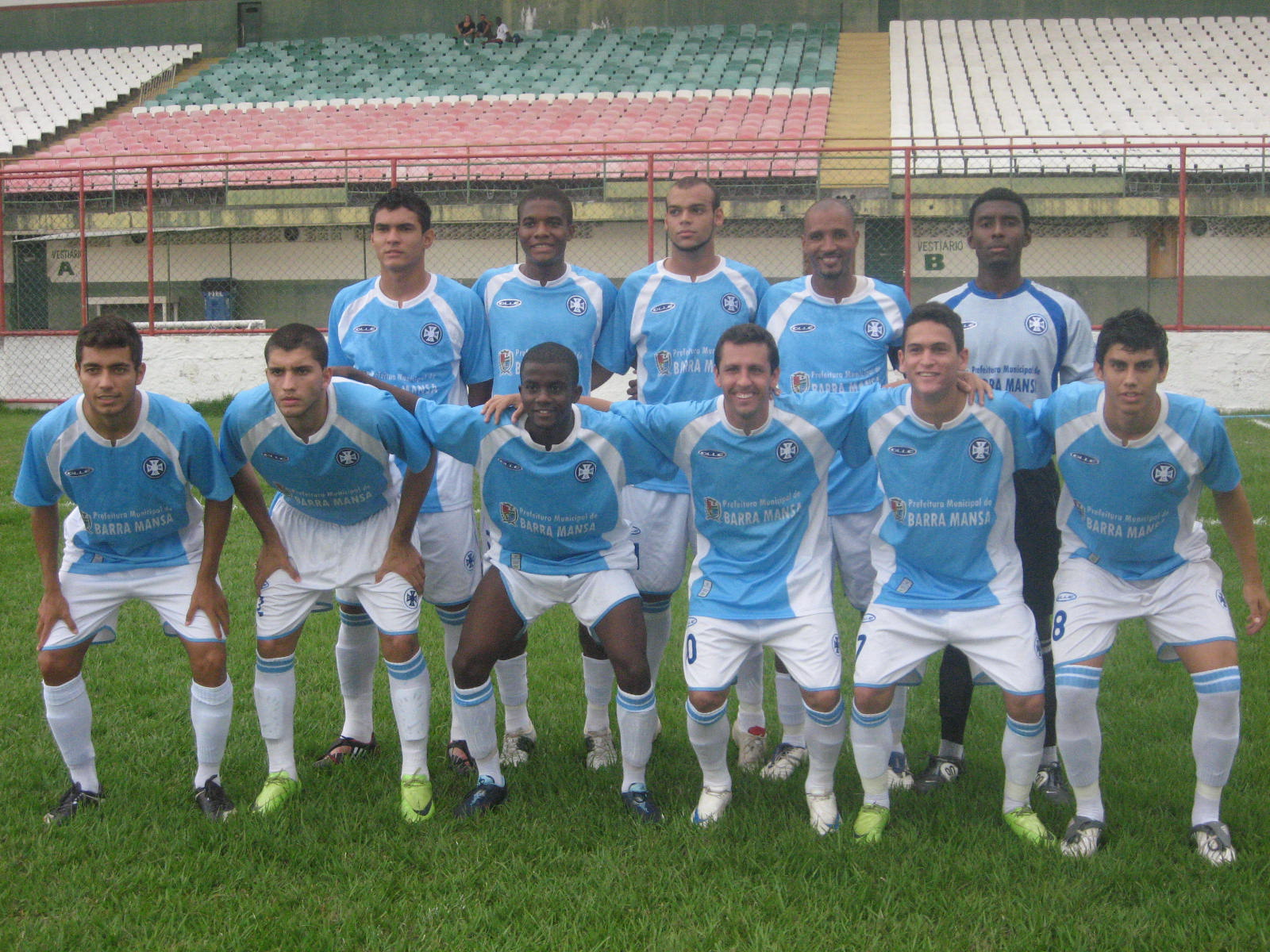 Equipe profissional do Barra Mansa Futebol Clube em 2010.